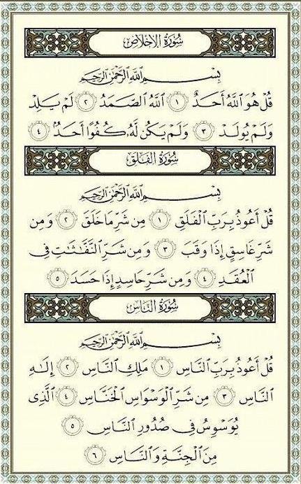 المعوذات